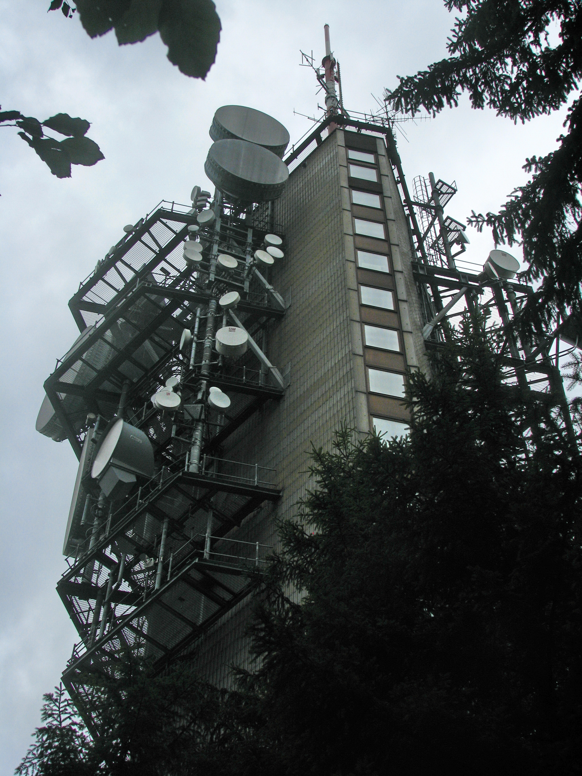 Felsenegg-Girstel TV-tower as seen from Felsensegg